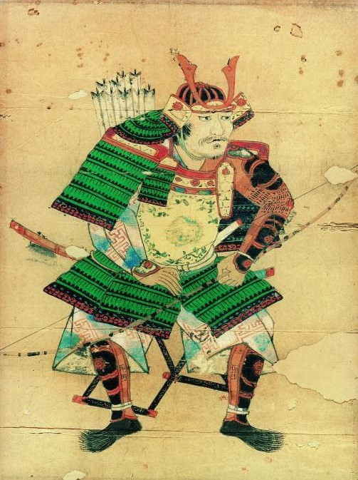 吉弘統幸の肖像。